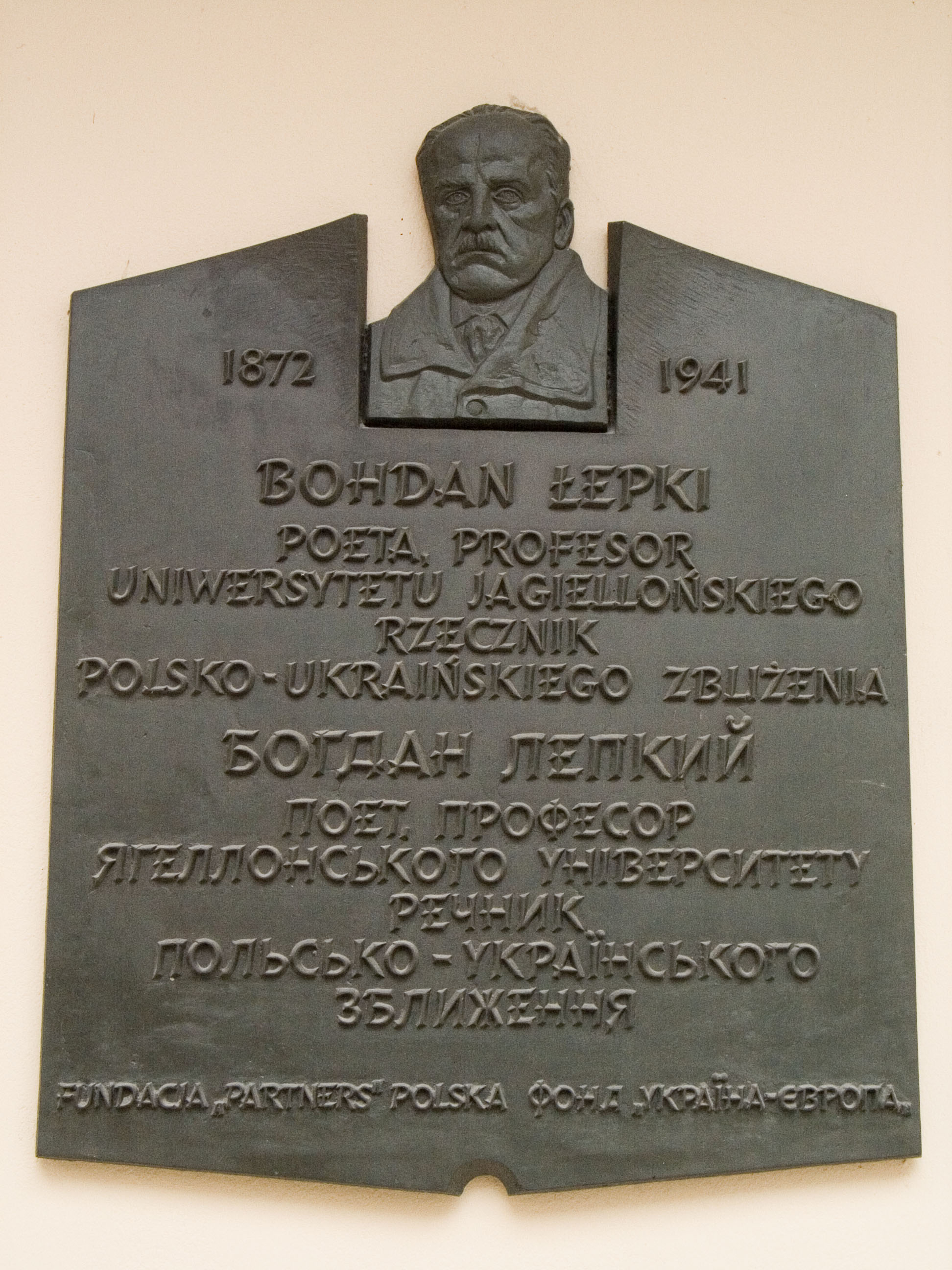 Tablica pamięci Bohdana Łepkiego, wmurowana w ścianę Instytutu Polonistyki UJ Photo by Iwona Grabska